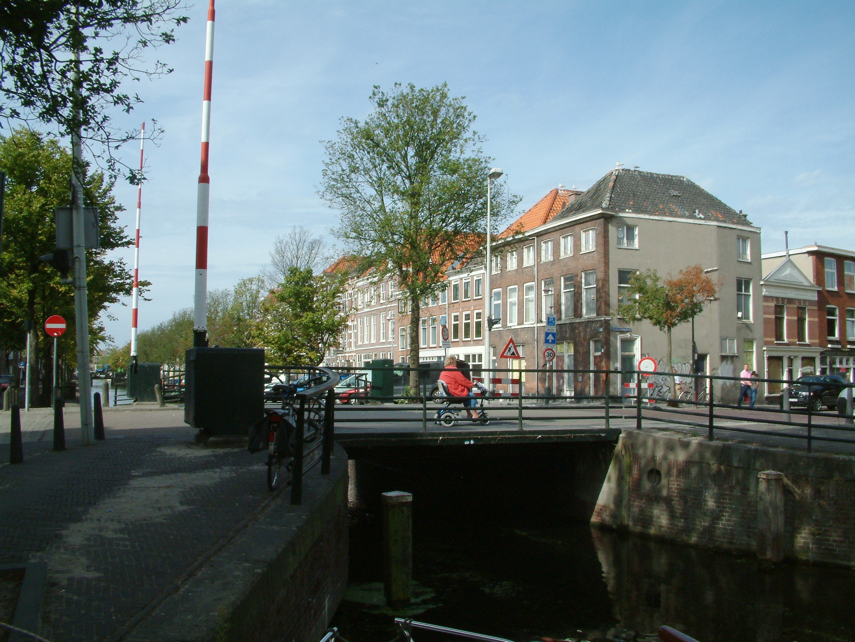 Brug in Den Haag